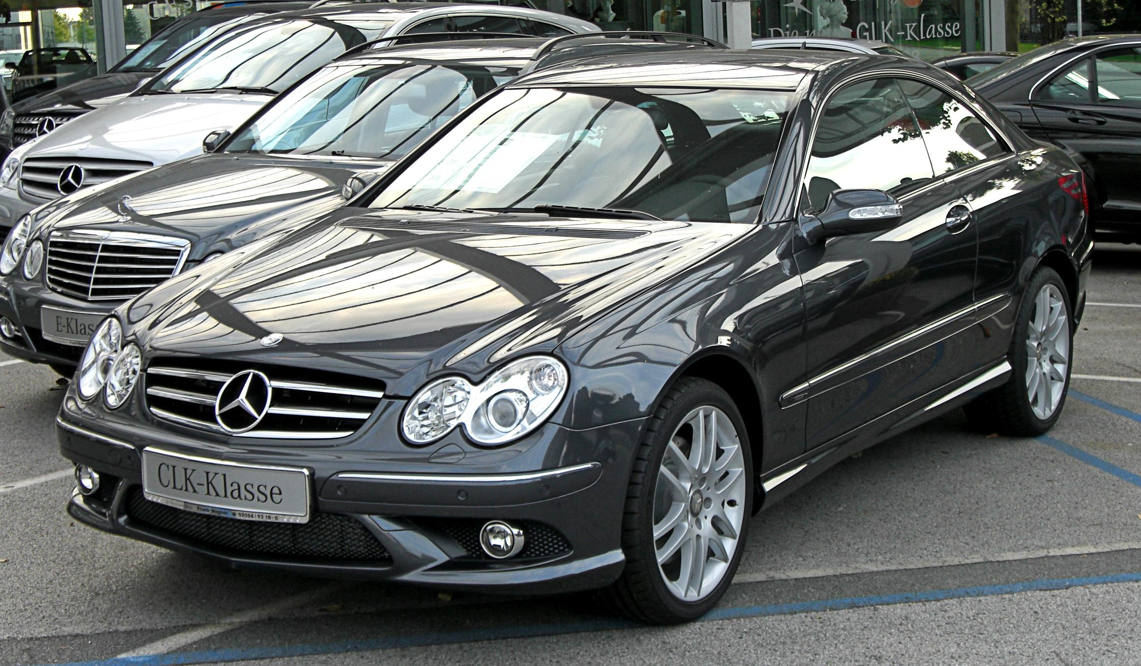 Mercedes CLK-Klasse